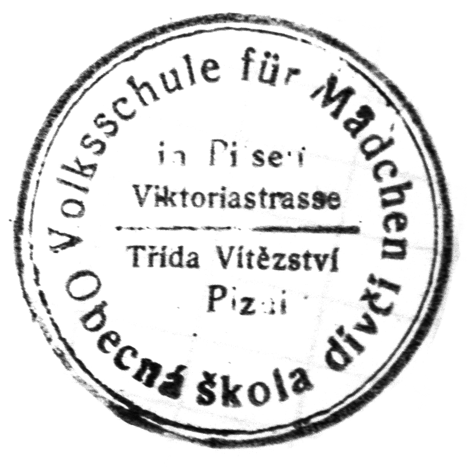 Dobové razítko obecné školy pro dívky na dnešní Americké třídě v Plzni, kam Věra se sestřenicí Edou chodila.